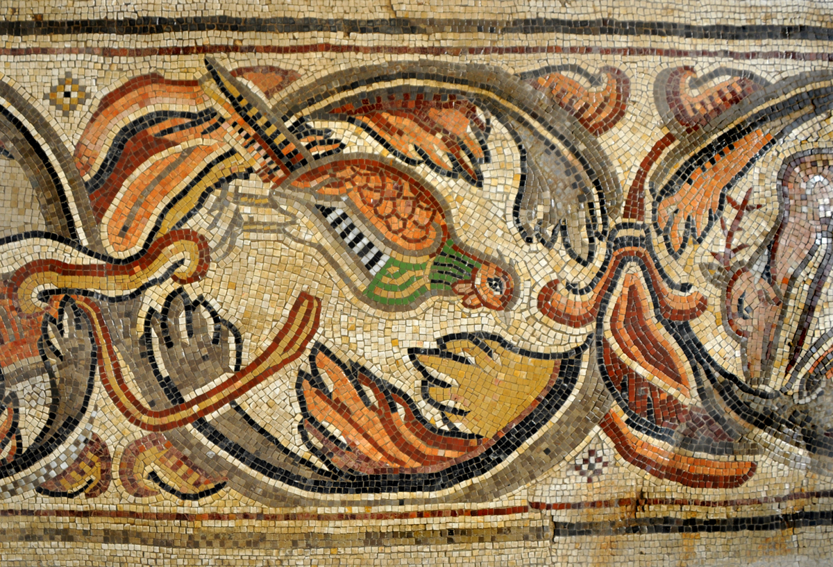 כנסייה מהתקופה הביזנטית ששרידיה נמצאו בשנת 1964 בשכונת "גבעת כצנלסון" בנהריה. שרידי הכנסייה מהמאה השישית כללו רצפת פסיפס הכוללת דמויות אדם ודמויות מעולם החי והצומח ודגמים גאומטריים. פסיפס פסיון